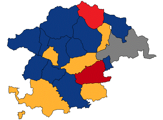 !Template:Llegenda }